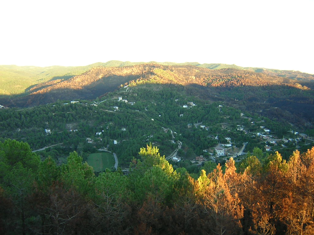 La Urbanització "Masia del Solà" des del Serrat del Llogari (Monistrol de Calders, Moianès)